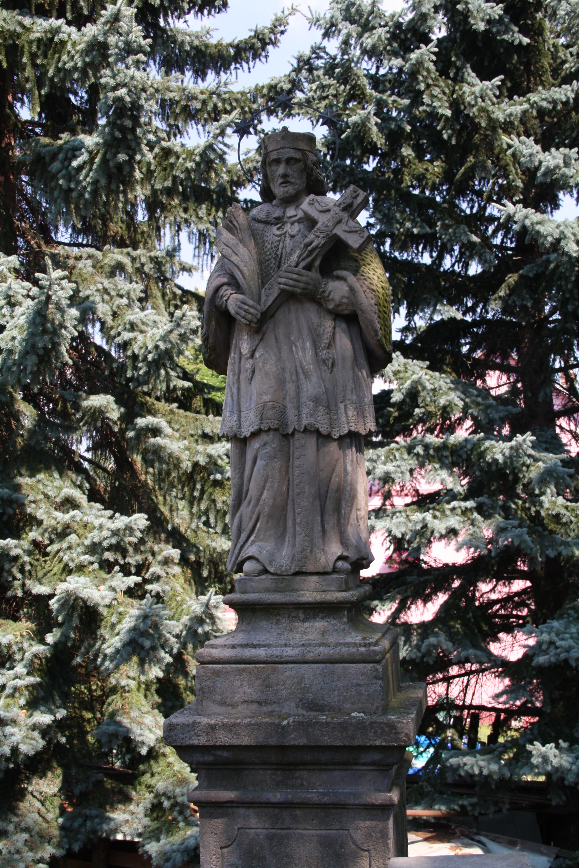 Mostek, Čermná (Libouchec).